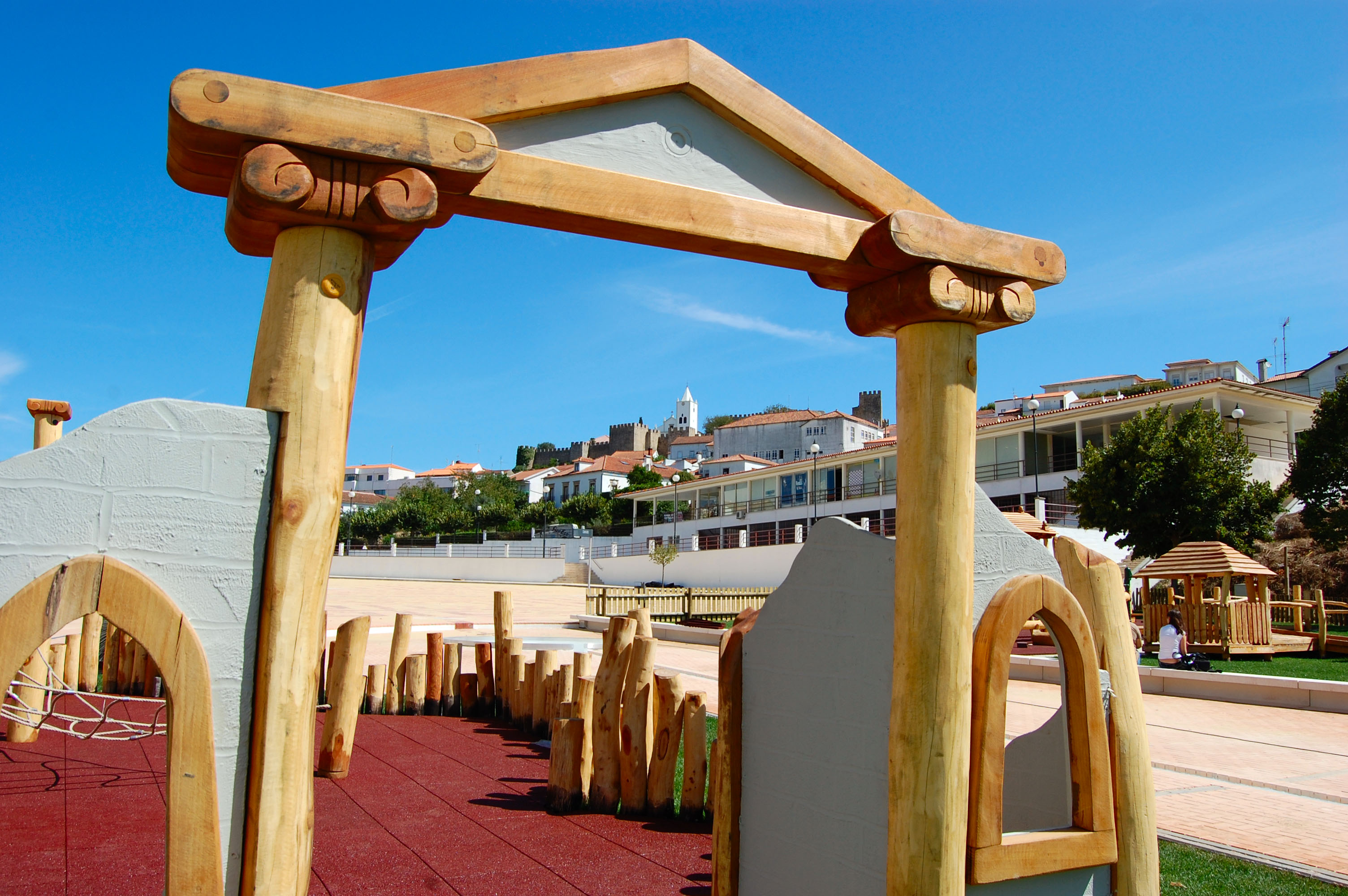 Parque das Águas Romanas situado na zona baixa da Vila de Penela